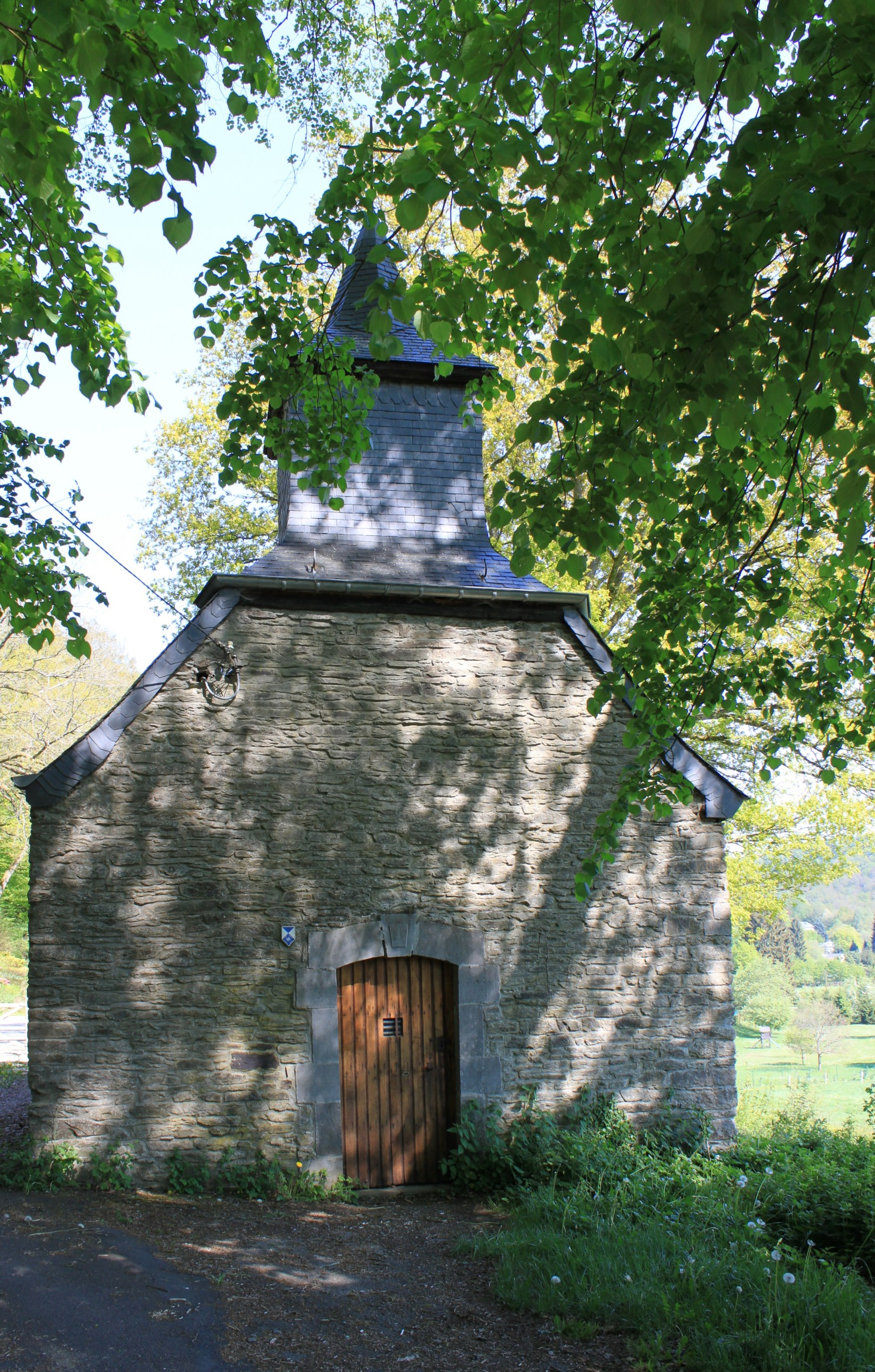 Chapelle Notre-Dame de Walcourt (M) et ensemble formé par cette chapelle et ses abords, y compris le chêne, le frêne, les tilleuls et le rideau de thuyas (S).